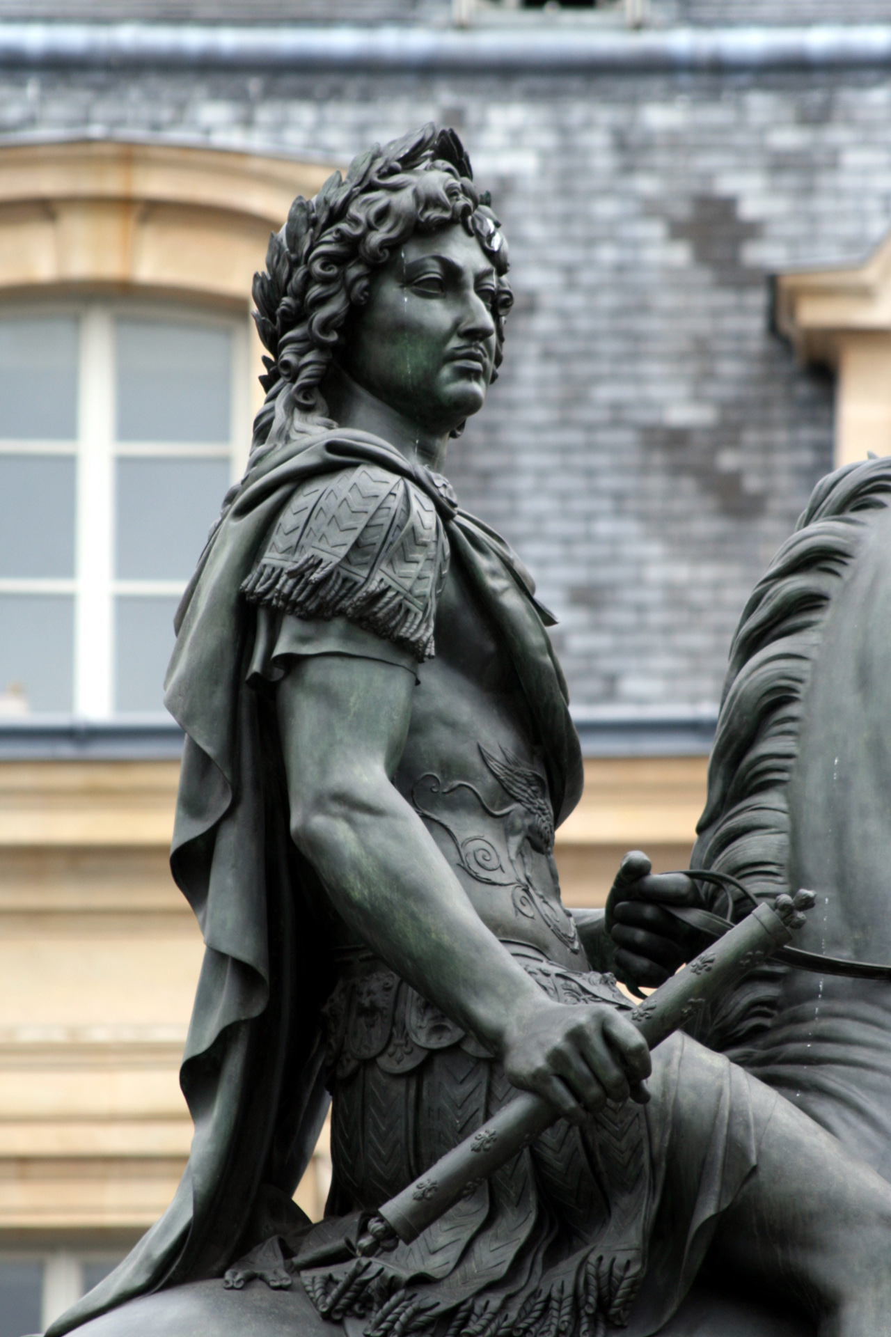 Statue Louis XIV place des Victoires